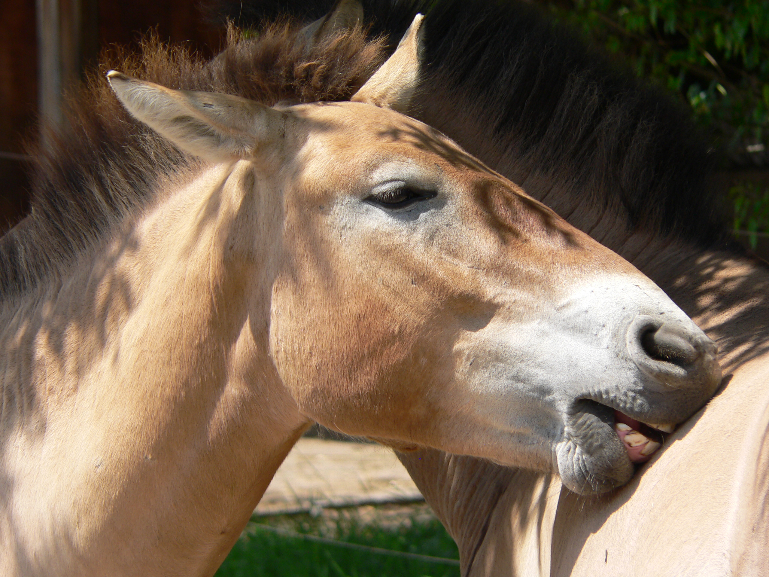 Przewalski Horse preening